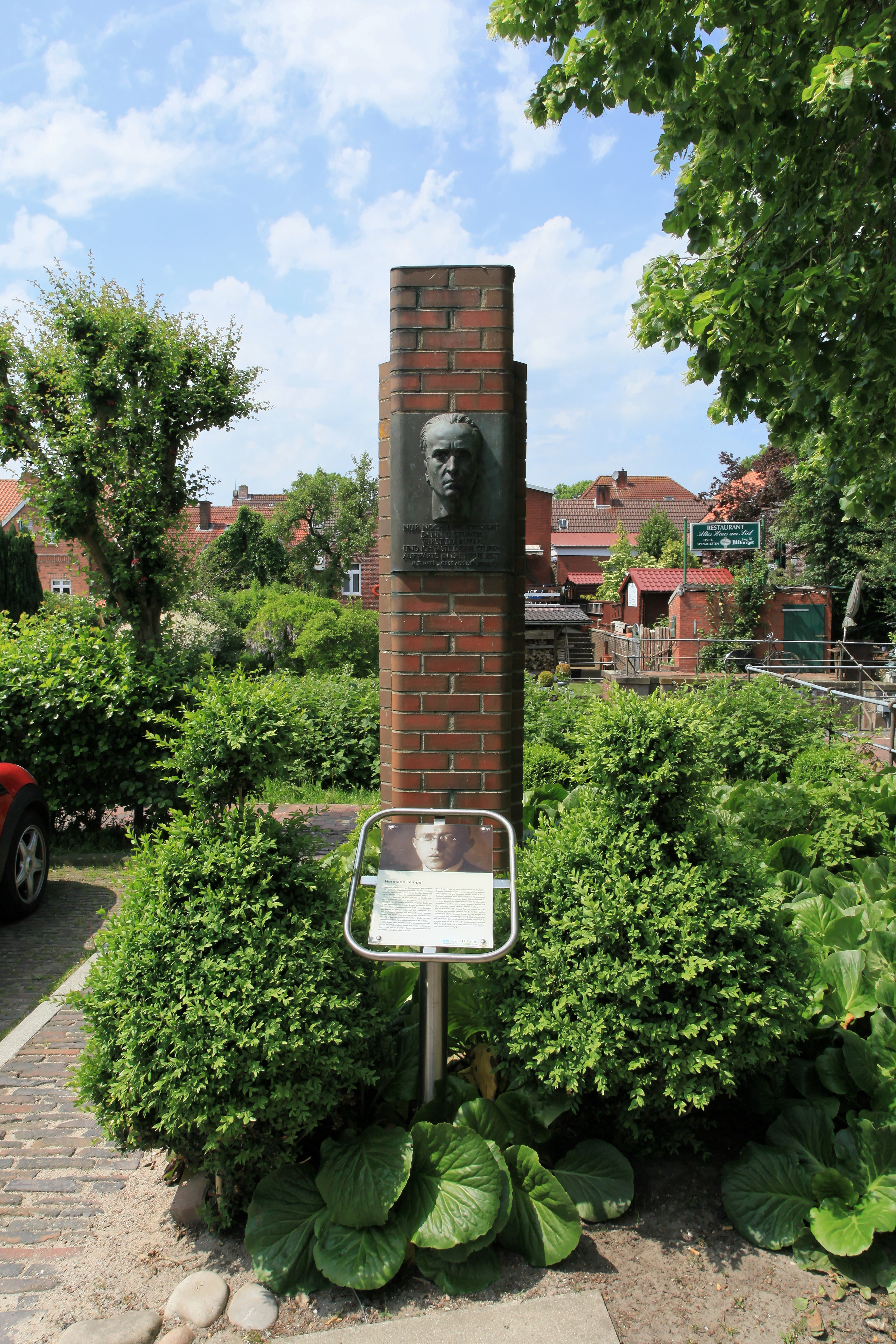 Hermann-Tempel-Denkmal, Hermann-Tempel-Platz in Ditzum, Jemgum